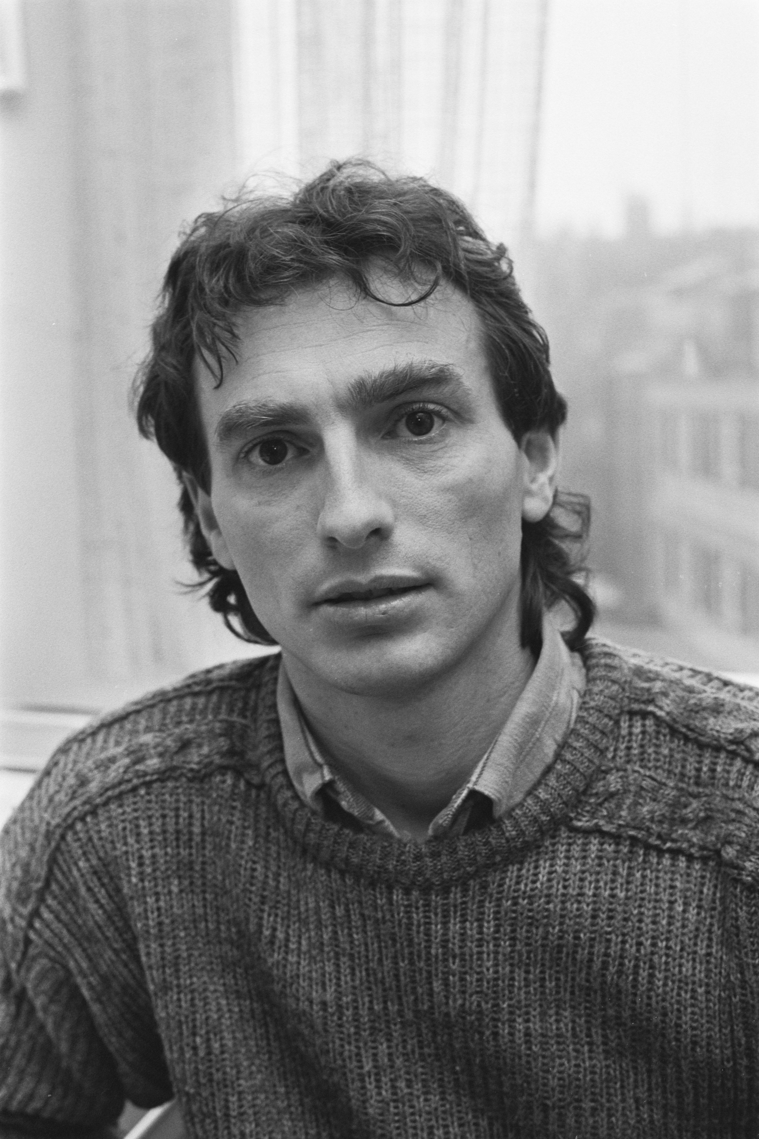 Collectie / Archief : Fotocollectie Anefo Reportage / Serie : [ onbekend ] Beschrijving : Rotterdamse stakingsleider Paul Rosenmöller (staking in de stukgoed) Datum : 22 januari 1987 Locatie : Rotterdam, Zuid-Holland Trefwoorden : portretten, stakingen Persoonsnaam : Rosenmöller, Paul Fotograaf : Croes, Rob C. / Anefo Auteursrechthebbende : Nationaal Archief Materiaalsoort : Negatief (zwart/wit) Nummer archiefinventaris : bekijk toegang 2.24.01.05 Bestanddeelnummer : 933-8684